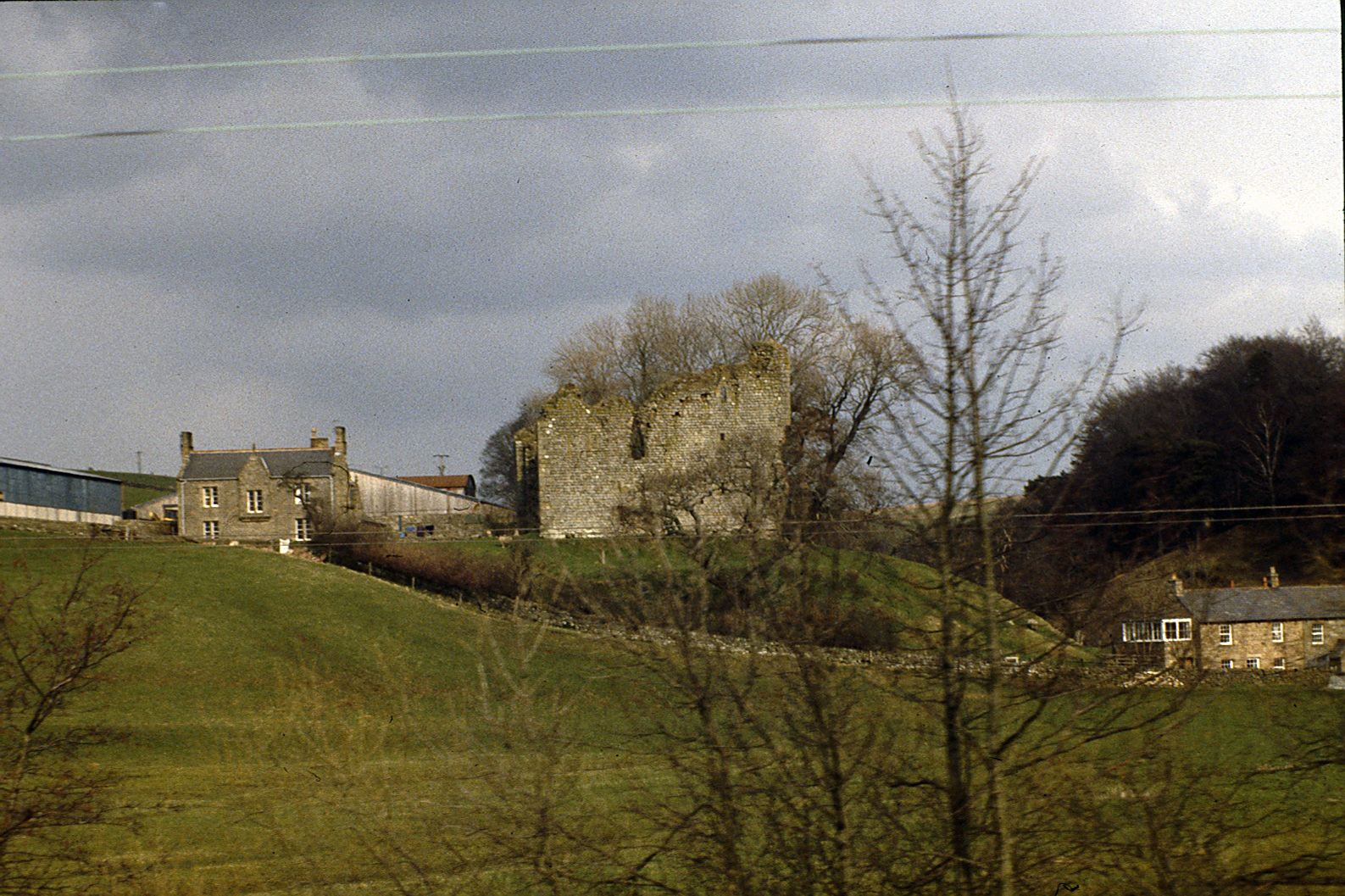 April 1983